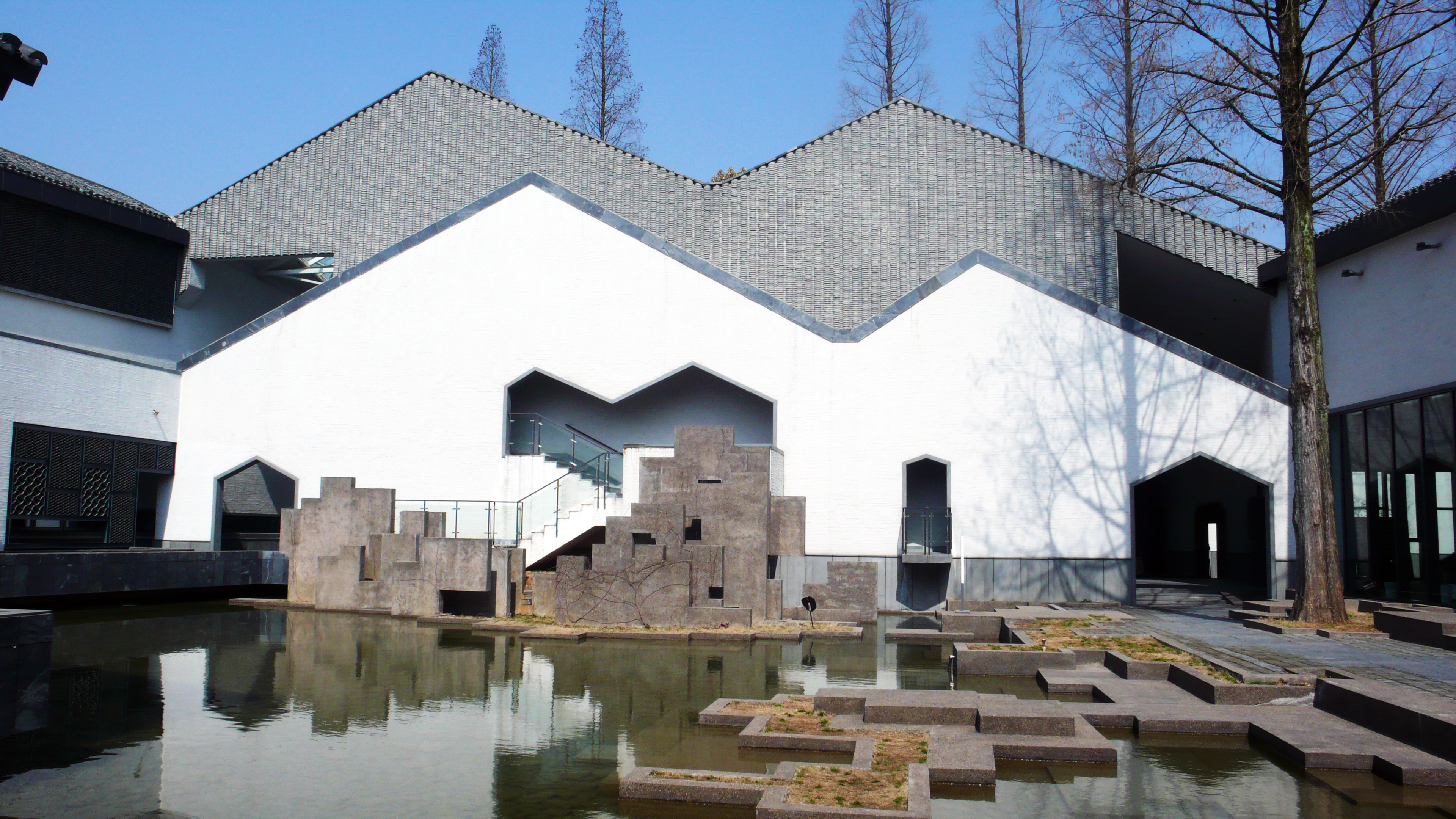 绩溪博物馆馆舍。